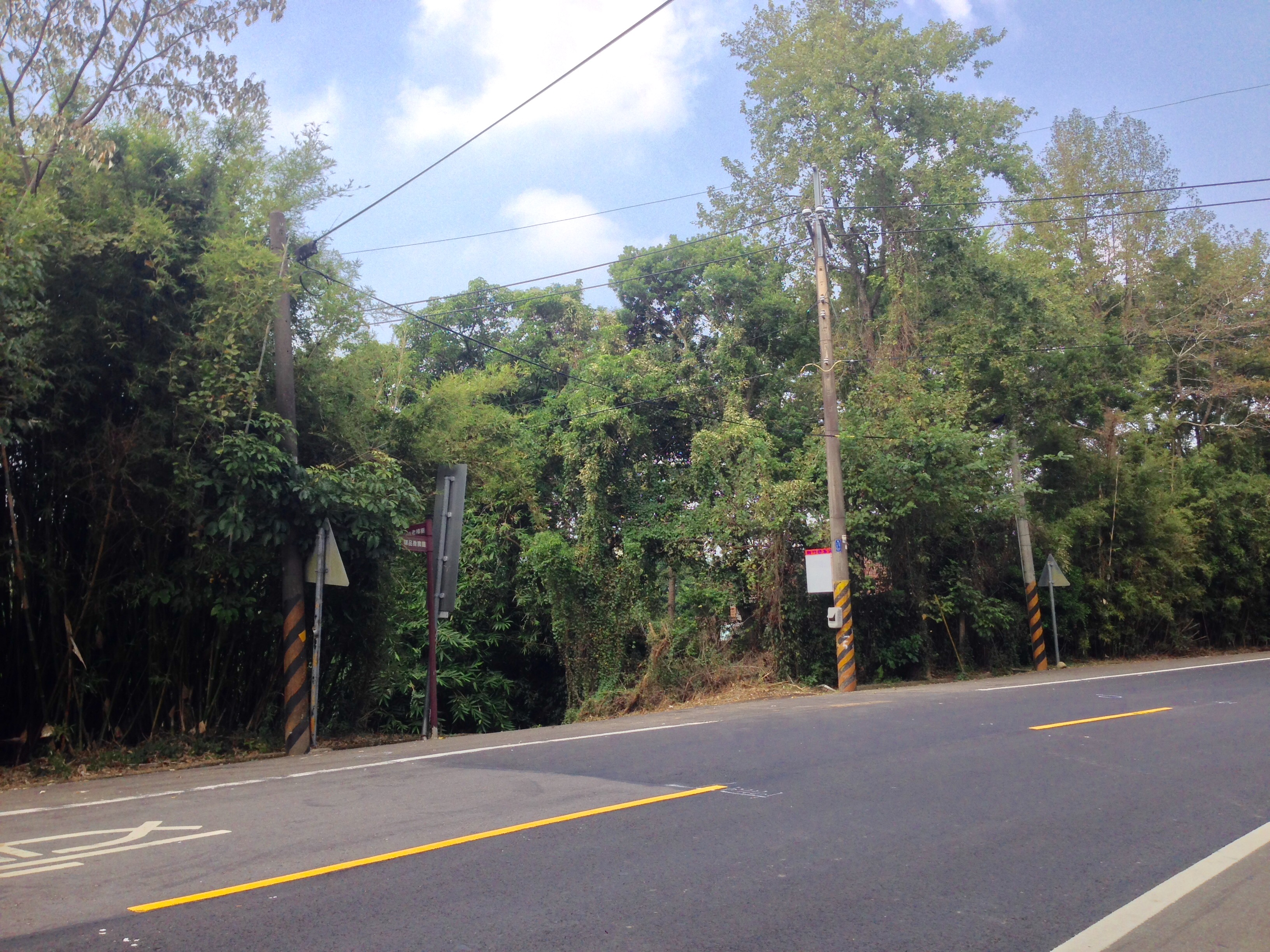 黃屋公車站牌與往楊梅樟樹伯公的道路。